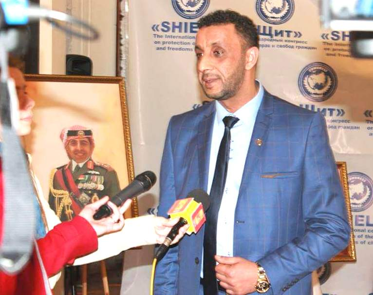 Салех Дагер на открытии выставки «The sand»